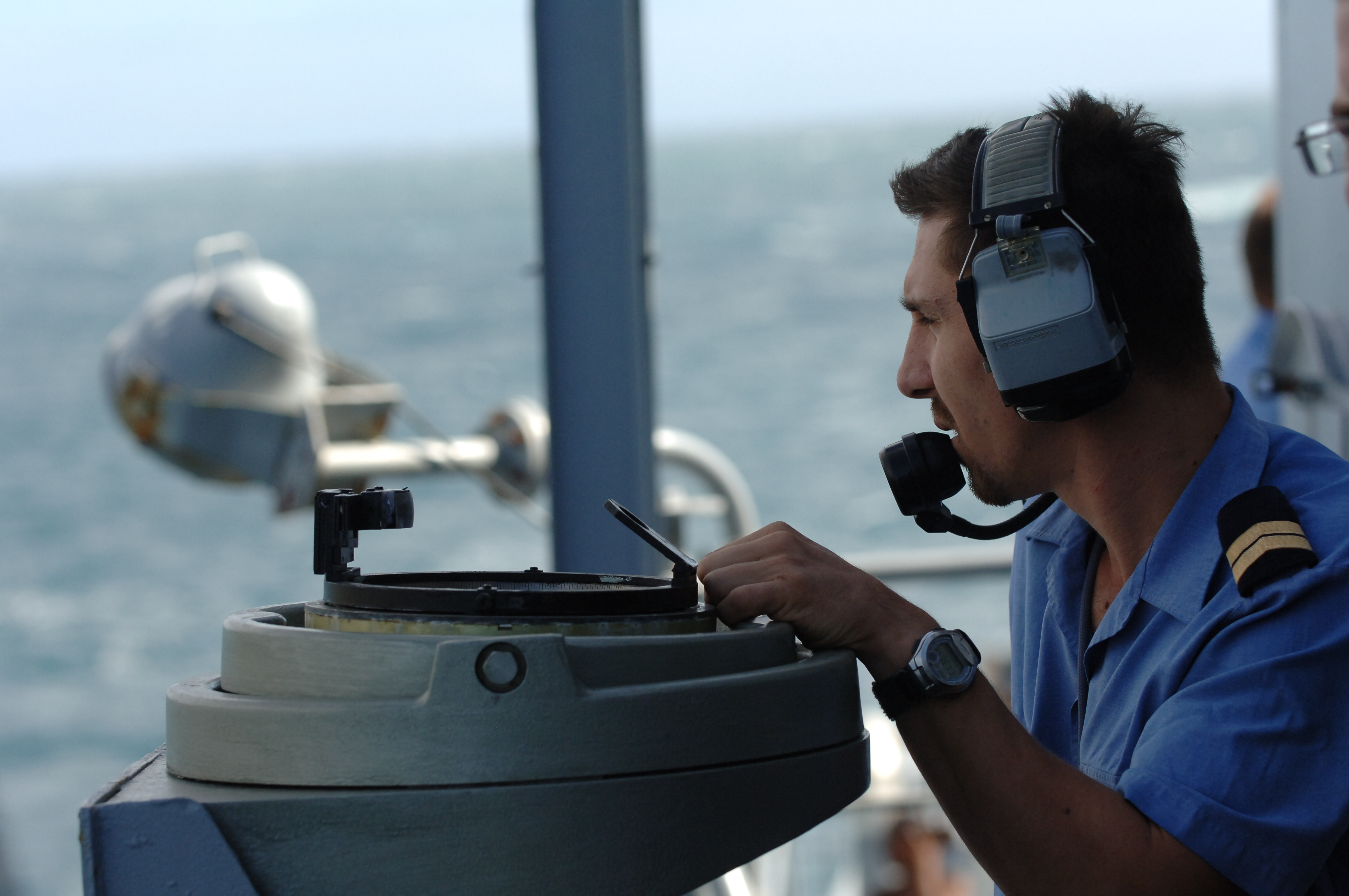 Le second maitre timonier surveille les relèvements sur l'allidade.